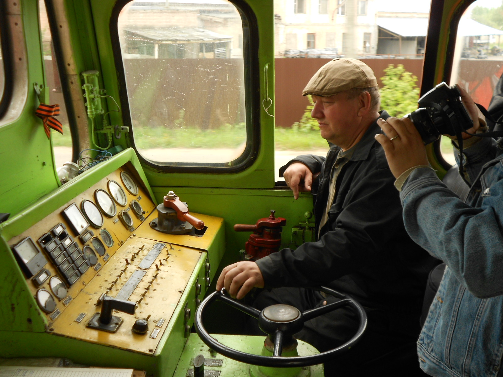 Интерьер кабины тепловоза ТГМ23В48. Пульт машиниста